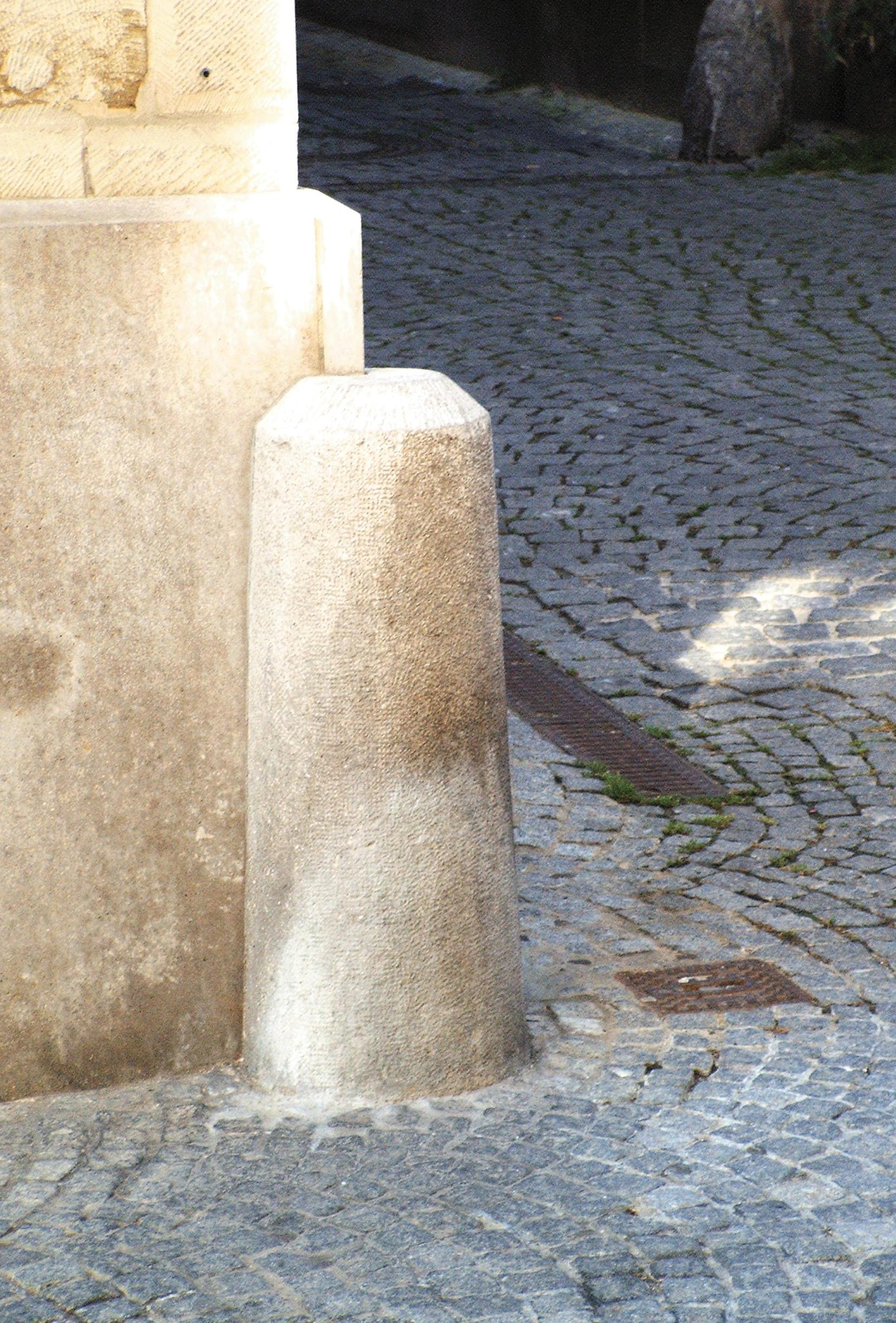 Radabweiser Beschreibung: Radabweiser in Kitzingen Urheber: Roland Bergmann Dipl. Ing. (FH) Architekt Erstellungsdatum: 04.07.2005 selbst erstellt: ja Quelle: eigenes Bildarchiv (für die GNU-FDL) oder (für Public Domain als Lizenzangabe)